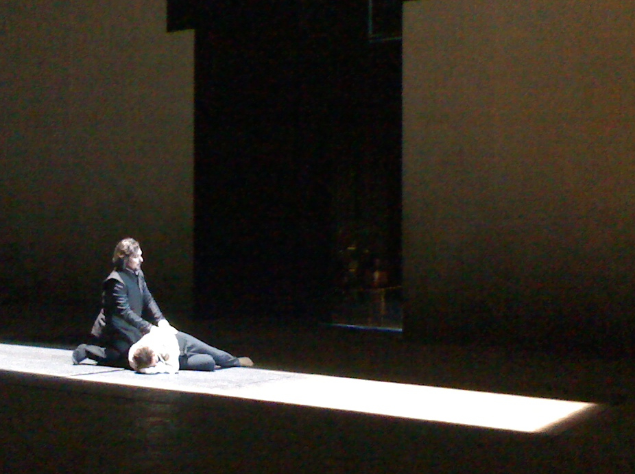 (ici avec Stefano Secco)